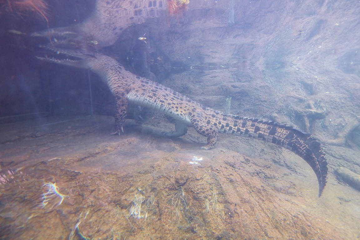 中文（香港）: 在香港濕地公園, 貝貝之家拍攝